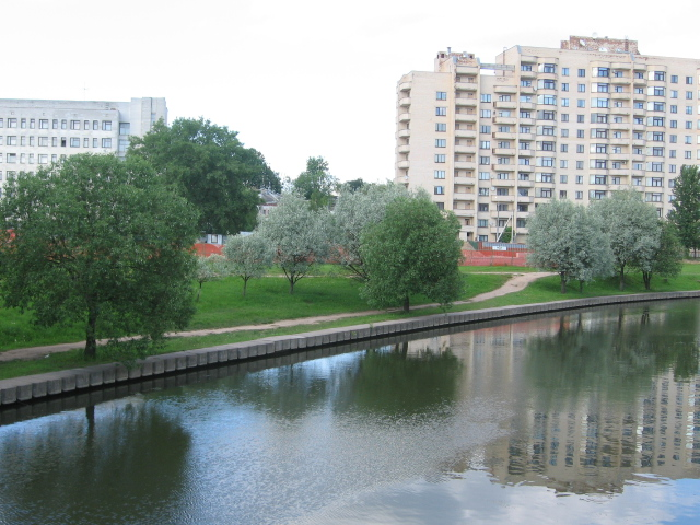 Место где некогда стояли валун "Дед" и минское языческое капище